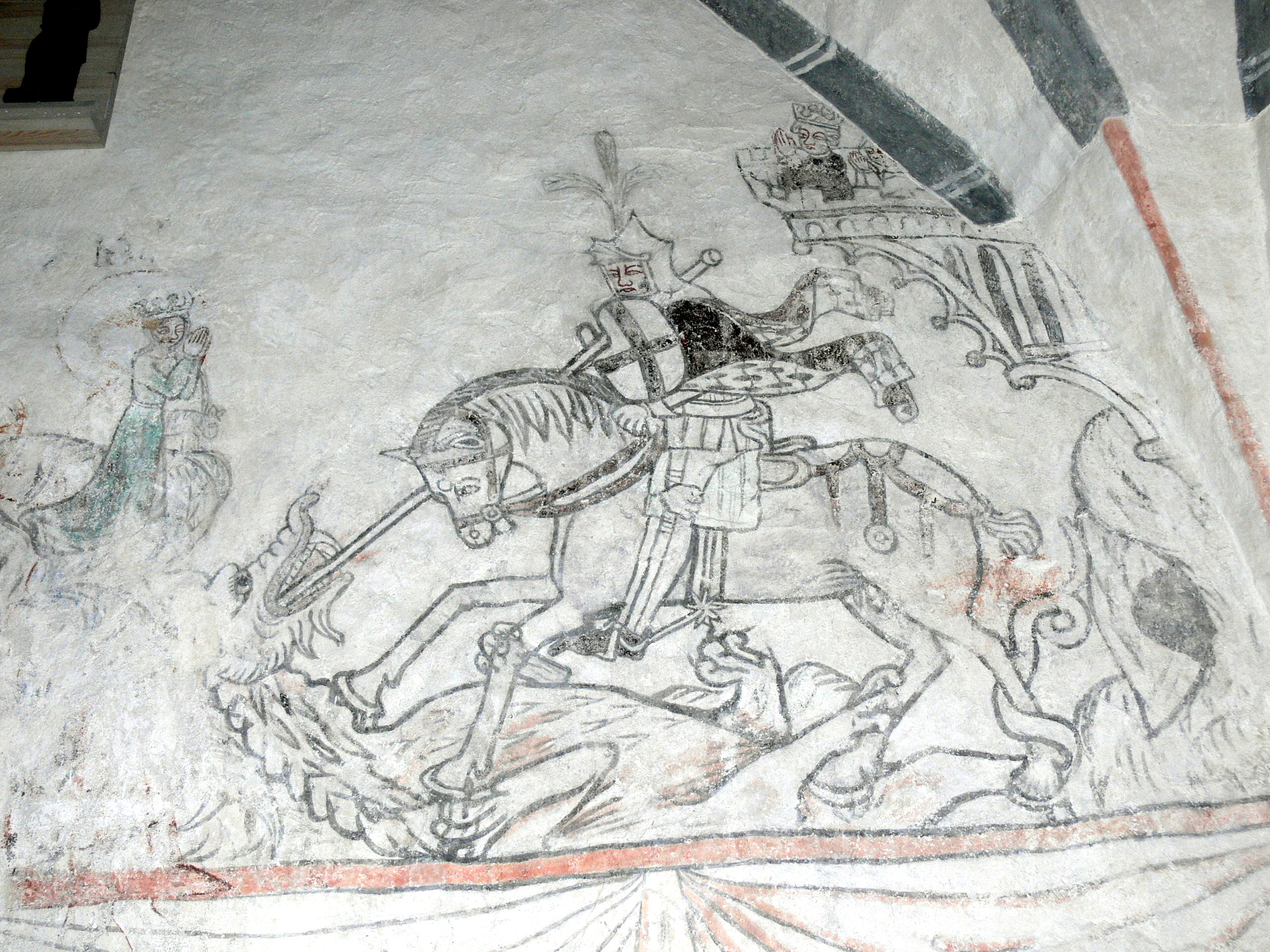 Bäl kyrka auf Gotland. Gotische Wandmalerei: St.Georg mit dem Drachen